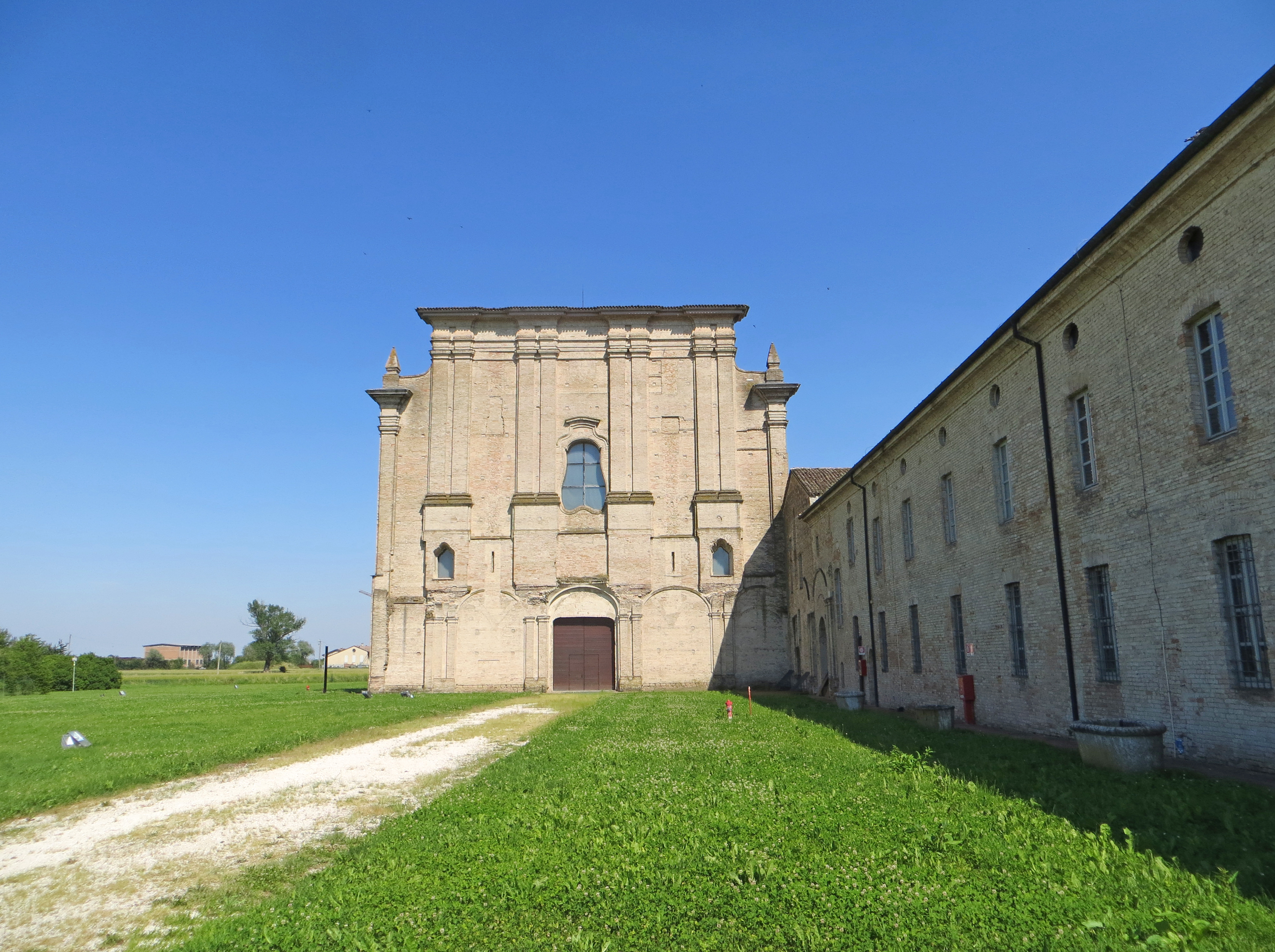 Abbazia di Valserena (Paradigna - Parma) - chiesa (facciata)